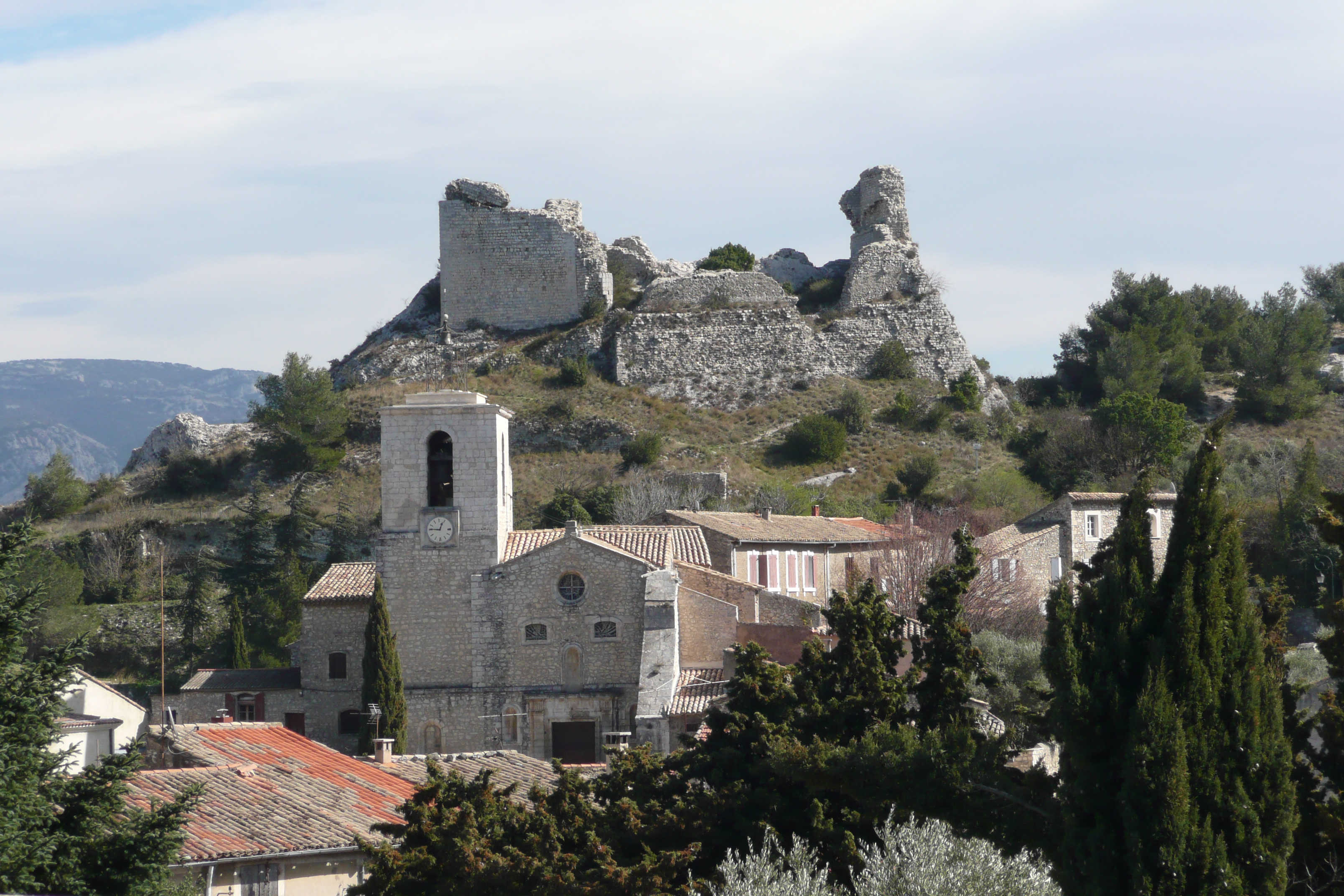 Orgon, au centre l'église.